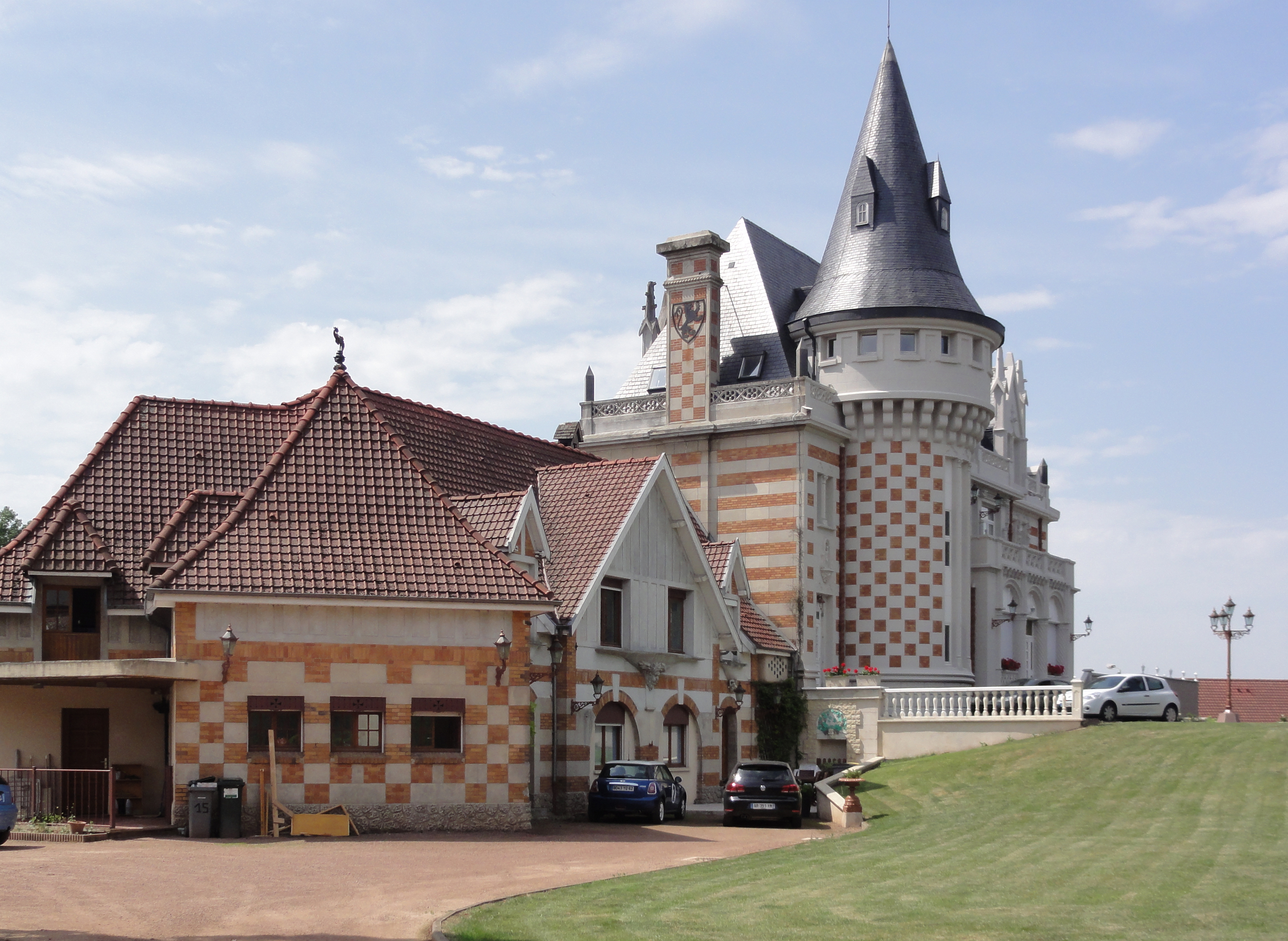 Famars (Nord,Fr) château, construit en 1918